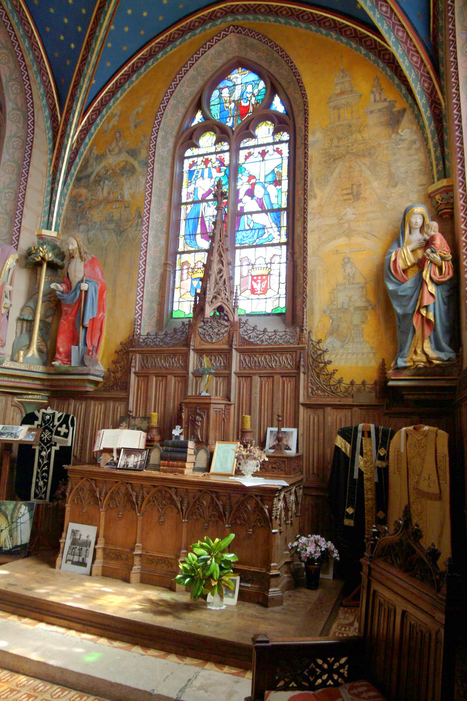 Chapelle du XVe du Château d'Etelan en Normandie (76) Auteur : Alain BOUDIER Date : Eté 2006 Permission : Alain BOUDIER, propriétaire du monument Droits : Libre de droits (Mention crédit obligatoire)